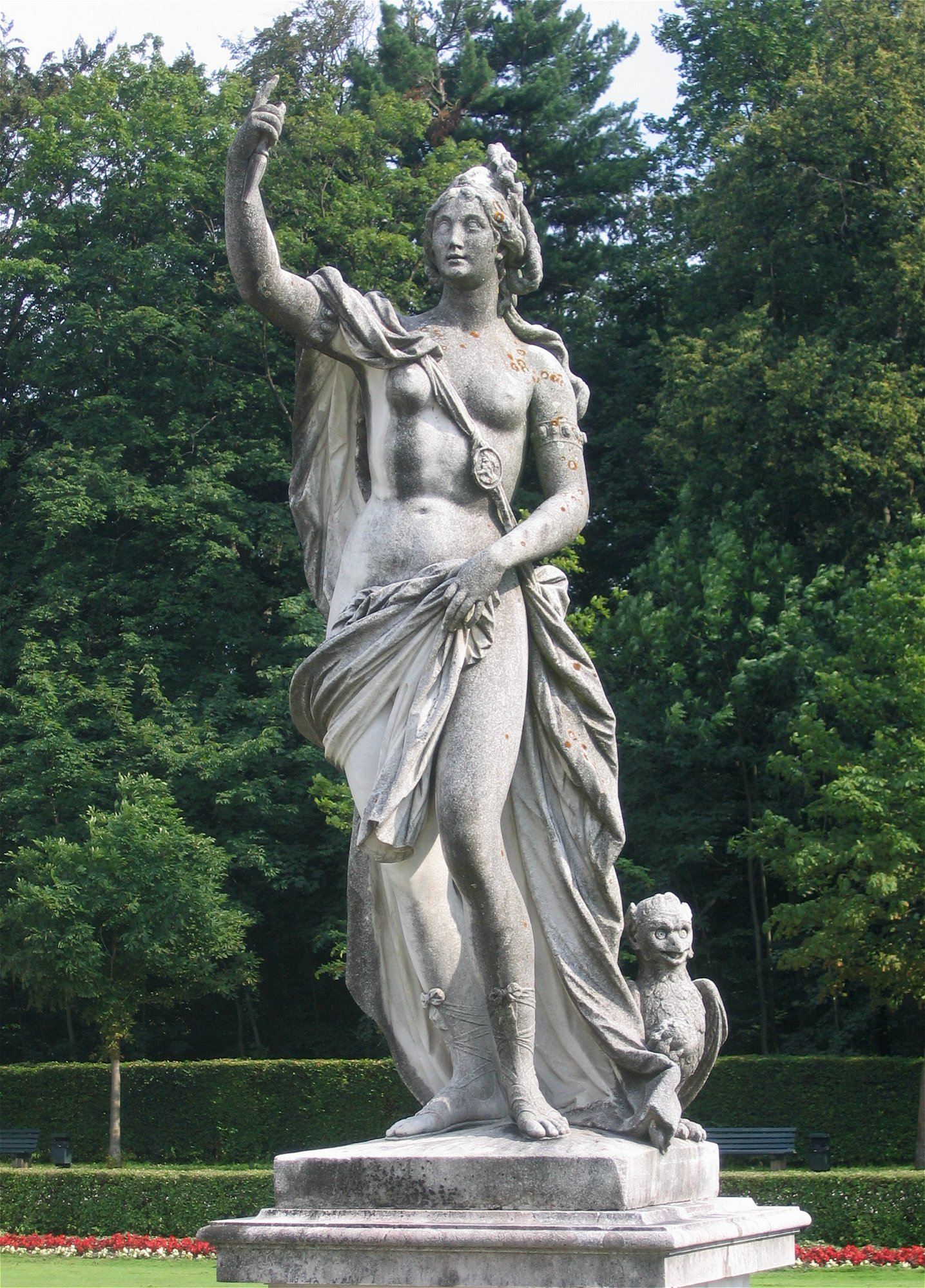 Proserpina-Statue von Dominikus Auliczek (1778) im Schlosspark Nymphenburg, München